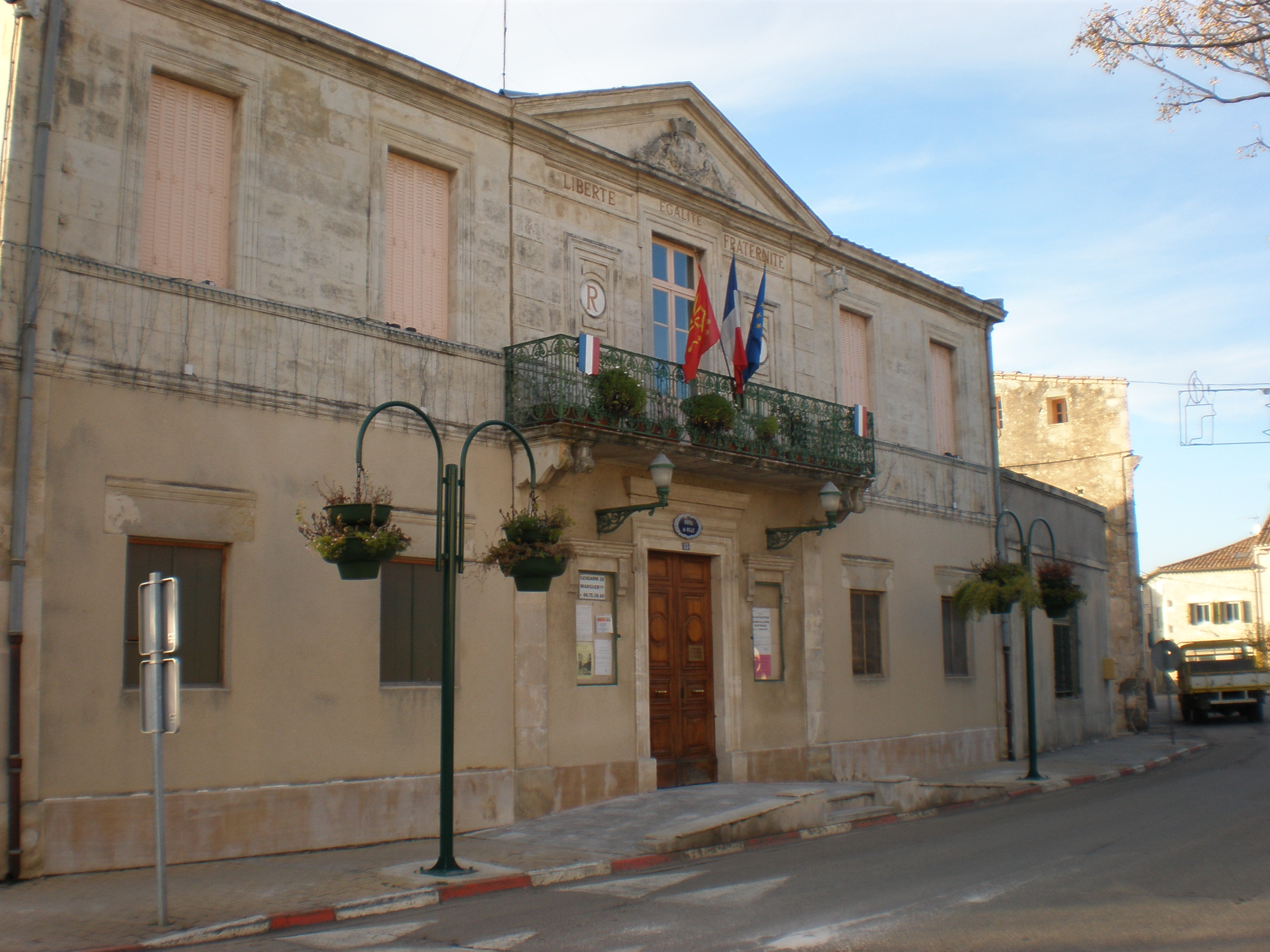 La mairie de Redessan (Gard)